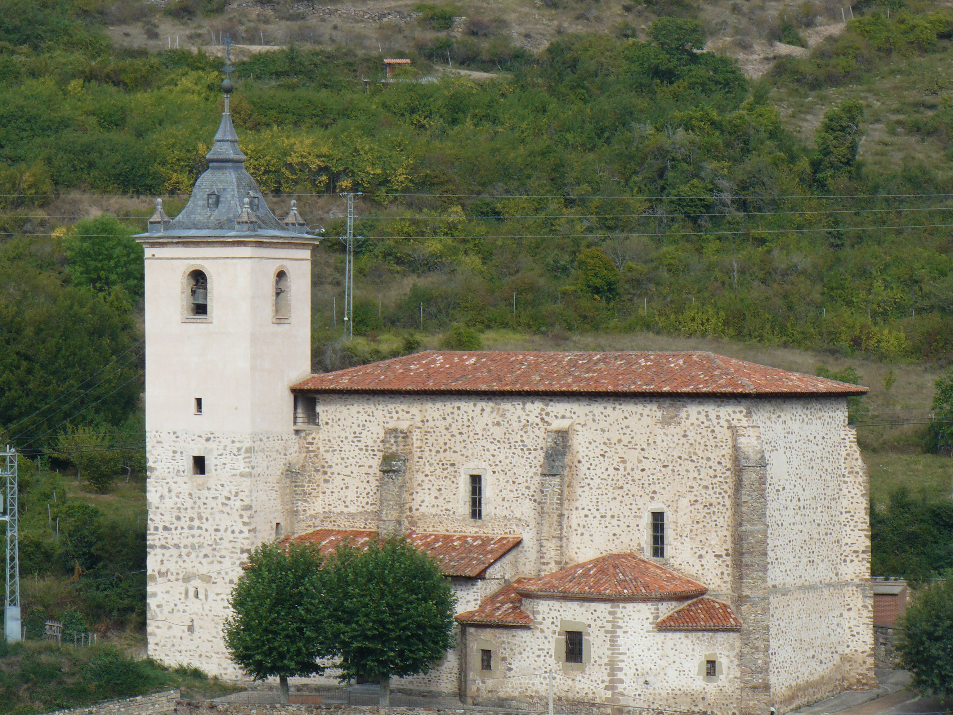 Villanueva de Cameros, La Rioja.